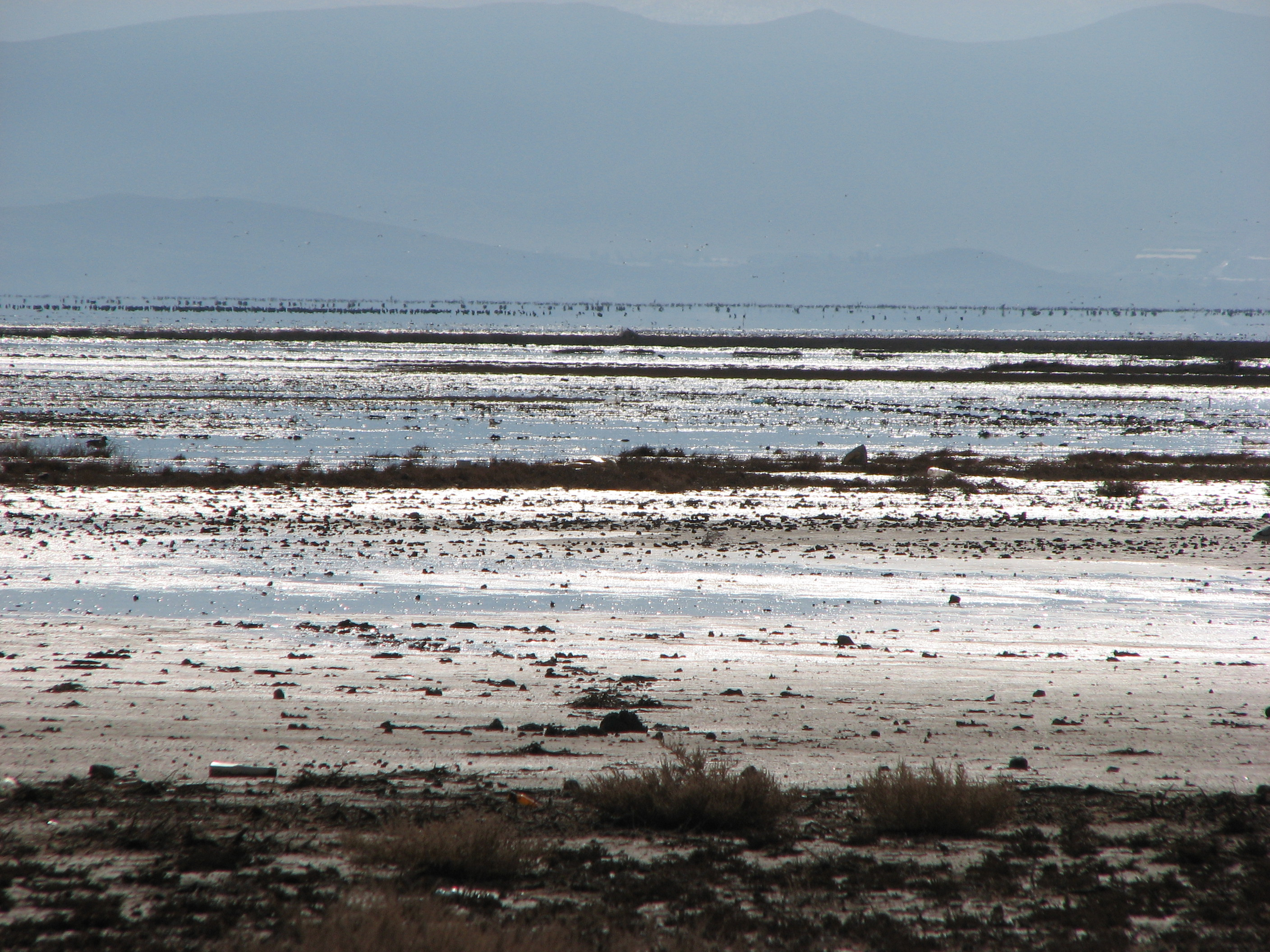 Image of Maharloo lake near Shiraz